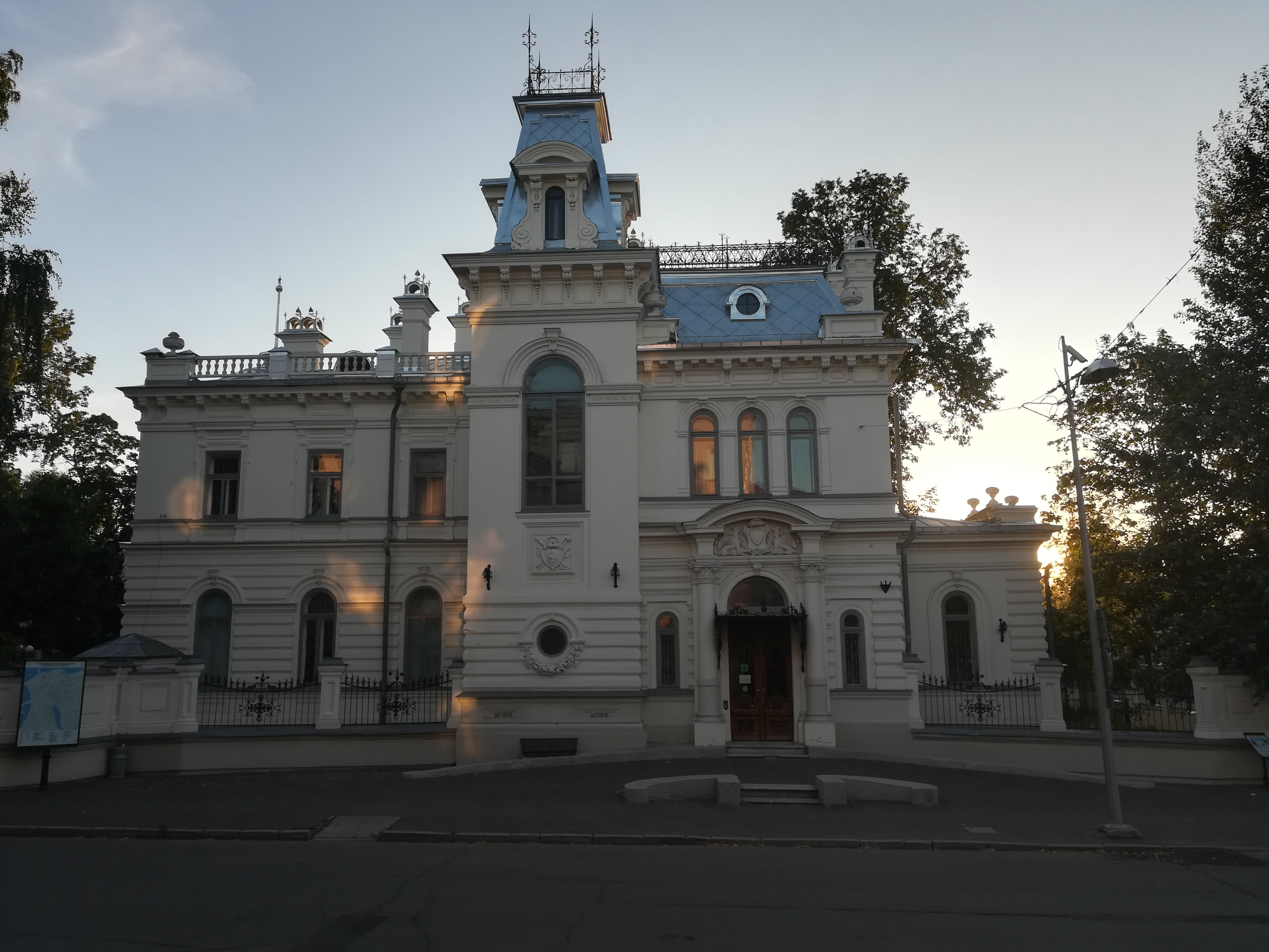 Улица